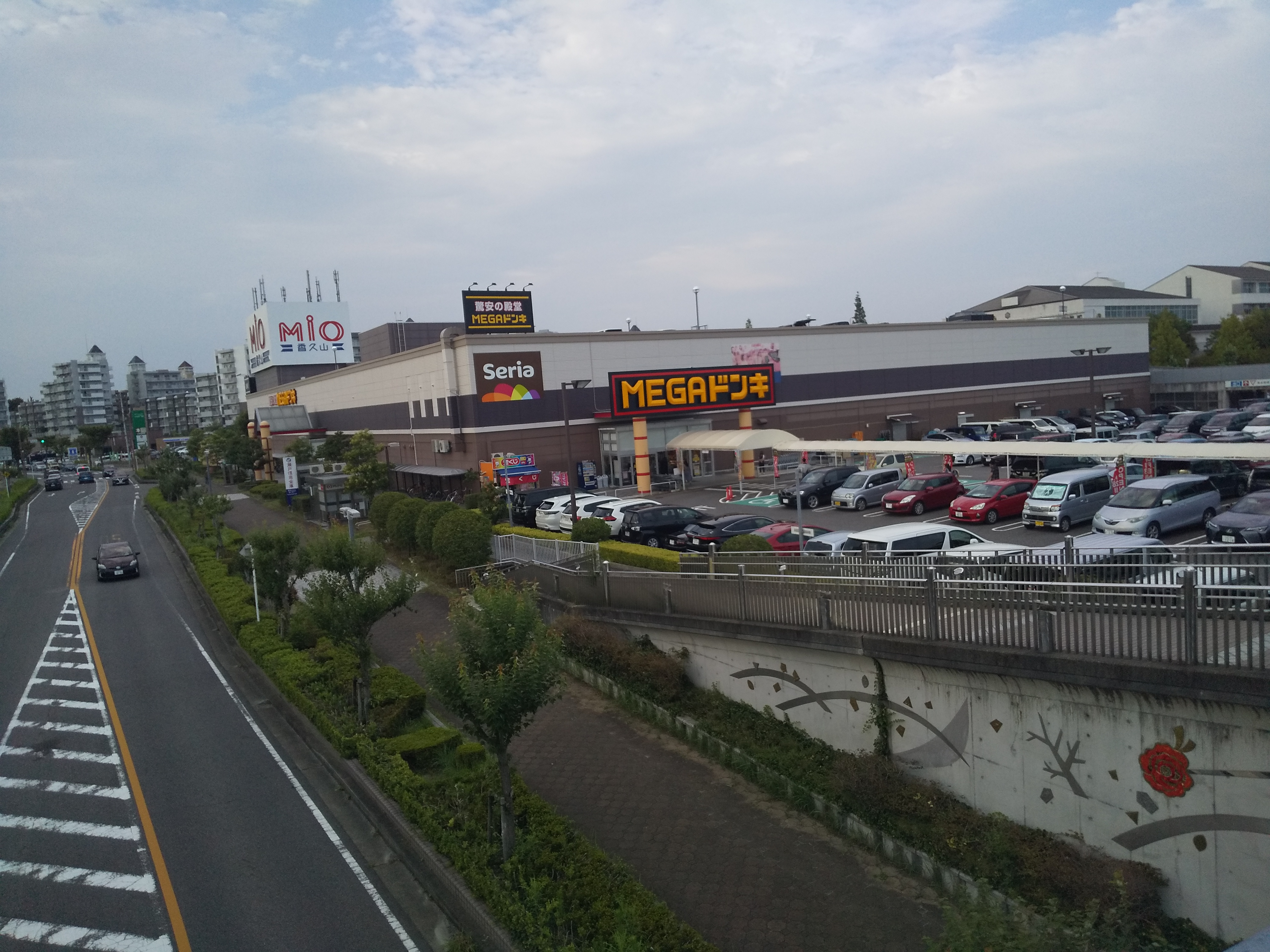 MiO香久山とキーテナントのMEGAドン・キホーテUNY香久山店（旧ピアゴ香久山店）。2020年7月28日にオープン。